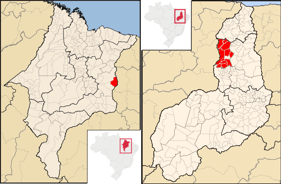 Mapa da Região Integrada de Desenvolvimento da Grande Teresina